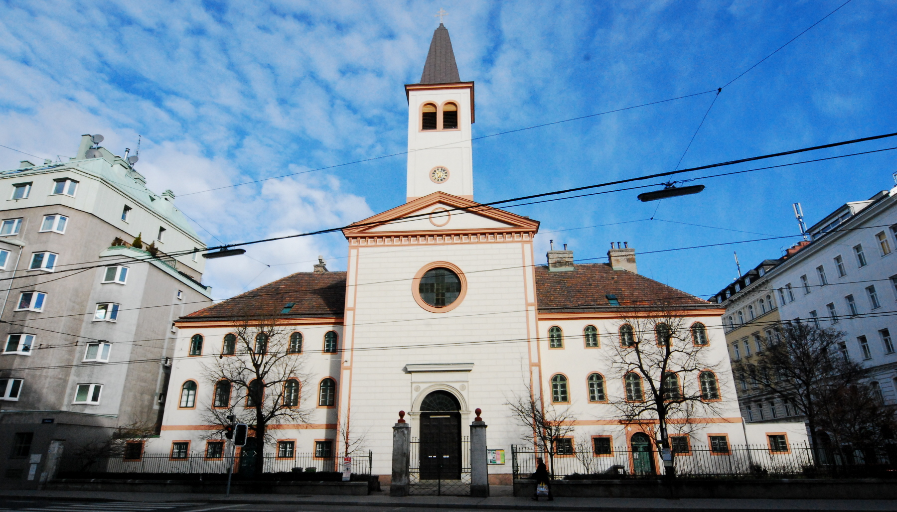 Kirche zum Allerheiligsten Erlösr am Rennweg in Wien-Landstraße